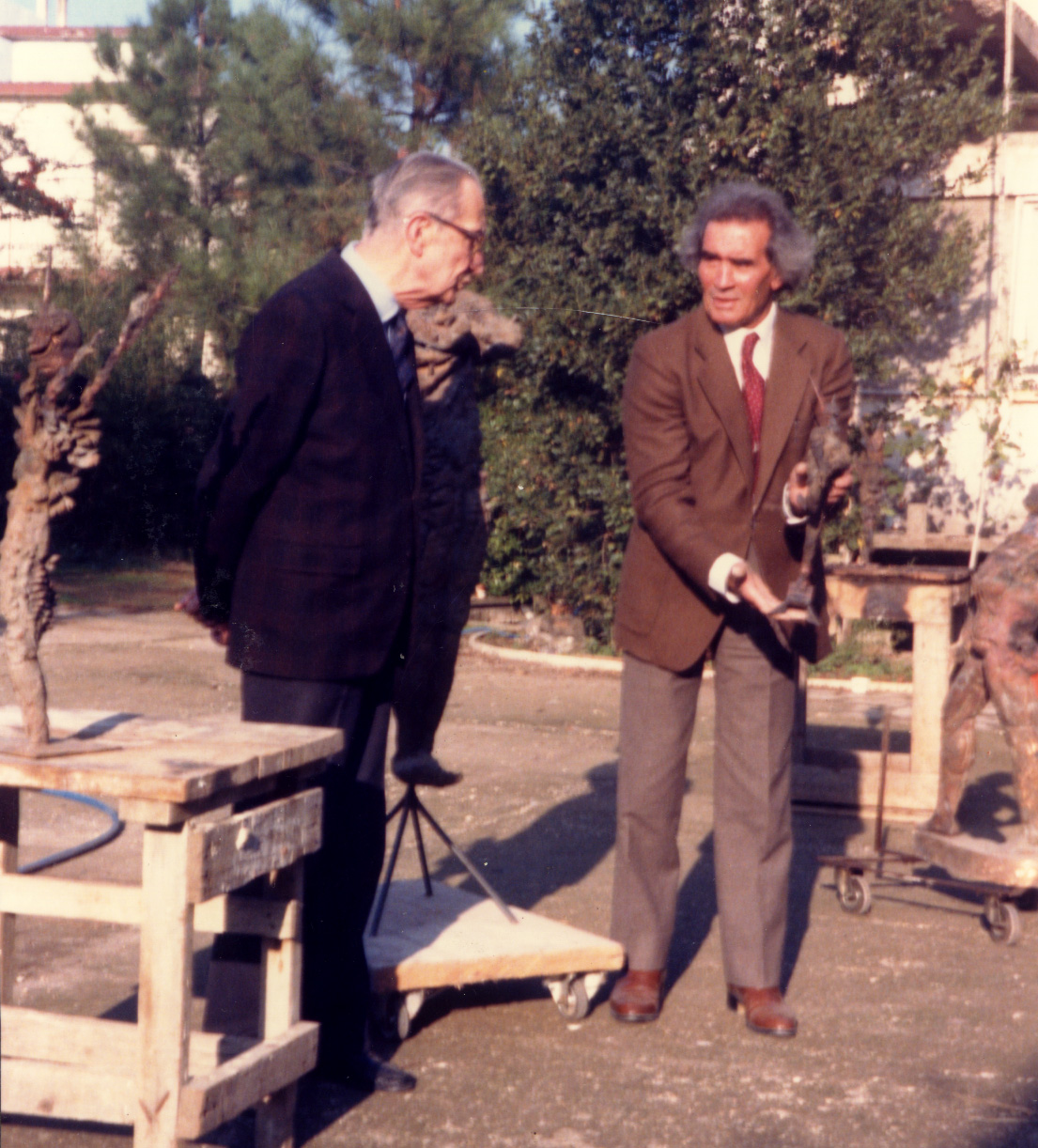 Il sindaco di Roma Giulio Carlo Argan in visita presso lo studio dello scultore Francesco Libonati